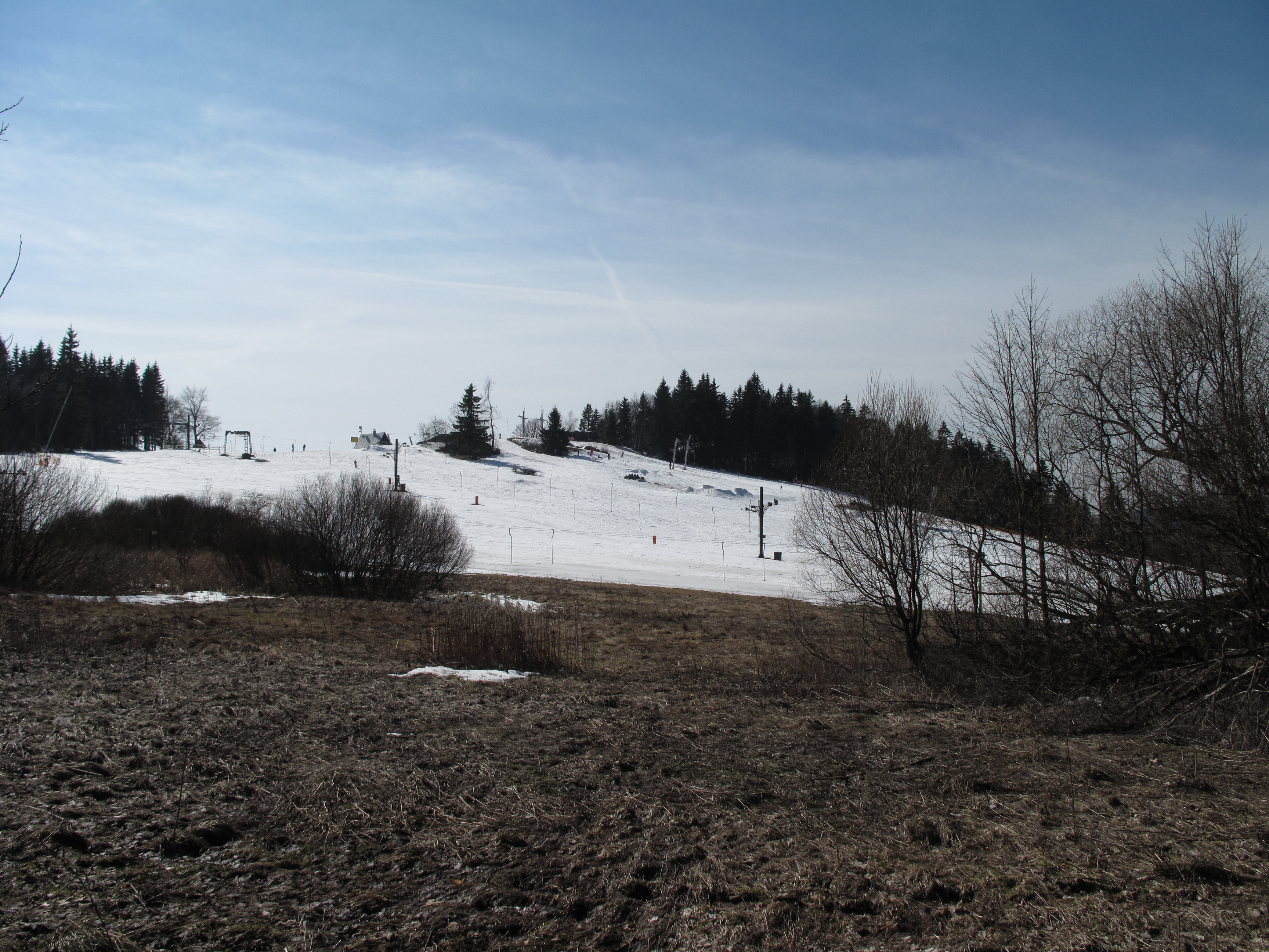 Sjezdovka v Hraběticích. Okres Jablonec nad Nisou, Česká republika.